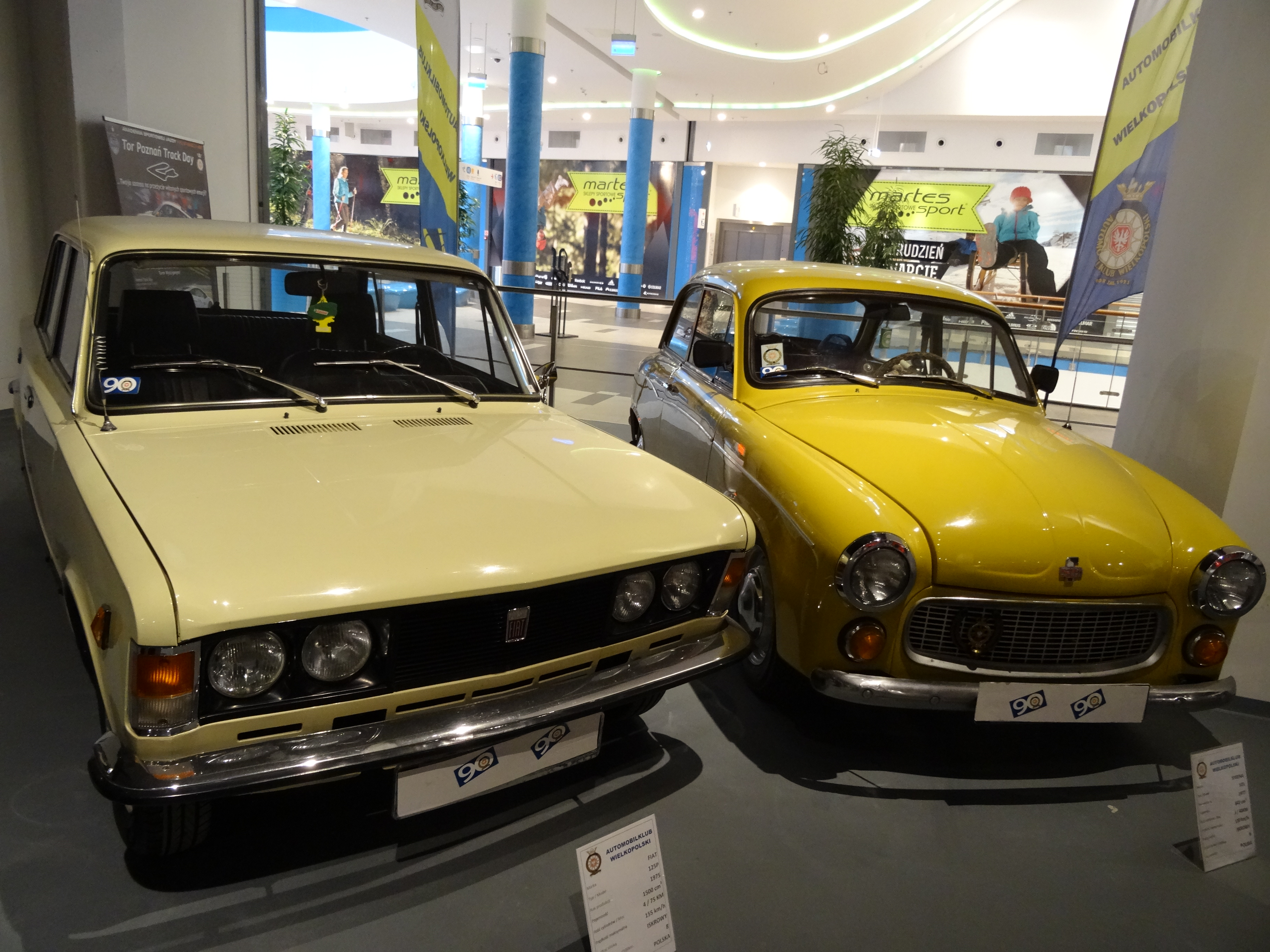 FSO Polski Fiat 125P z 1975 roku i FSM Syrena 105 z 1977 r.